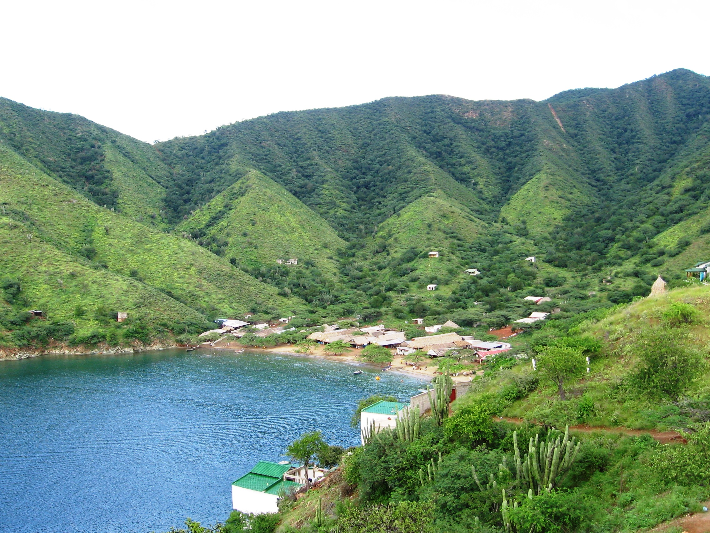 Playa Grande, Taganga, Santa Marta, Magdalena, Colombia.